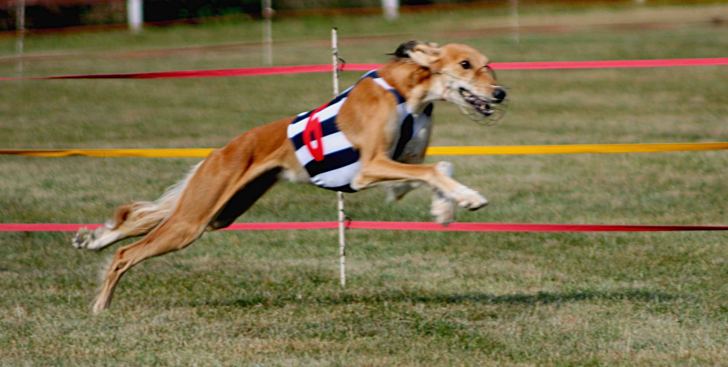 Chart perski Saluki podczas torowych wyścigów chartów w Bytomiu-Szombierkach.